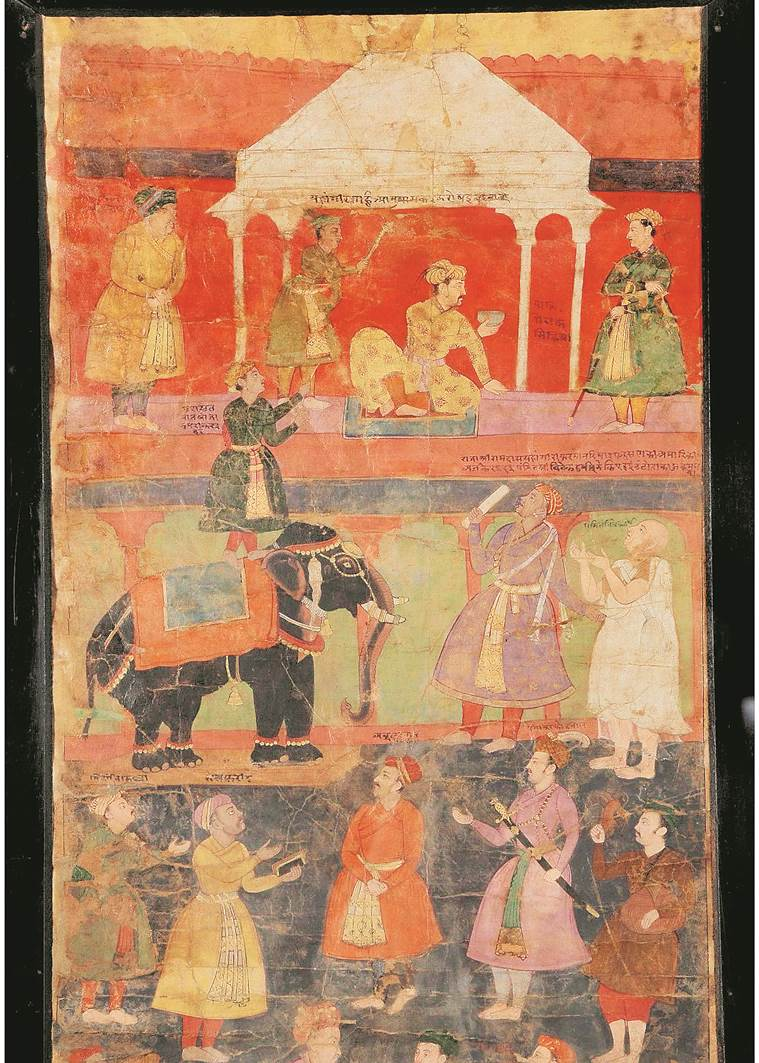 Jehangir interdisent de manger la viande